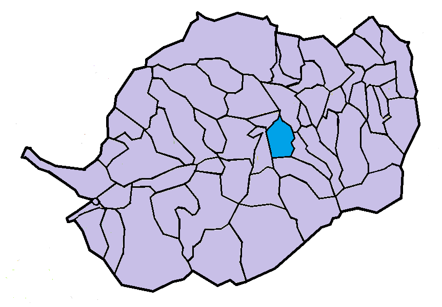 Cornellà de Conflent a la seva comarca, a partir del mapa municipal del Conflent de lliure disposició adaptat al Nomenclàtor toponímic aprovat el 2007